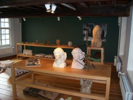 beeldhouwersatelier in het museum 't Schippershof